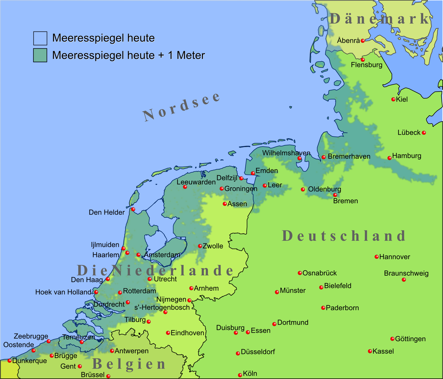 Nordseeanrainerstaaten Belgien, Niederlande, Deutschland und Dänemark mit Gebieten, die unter Normalnull plus 1 Meter (NN+1m) liegen.